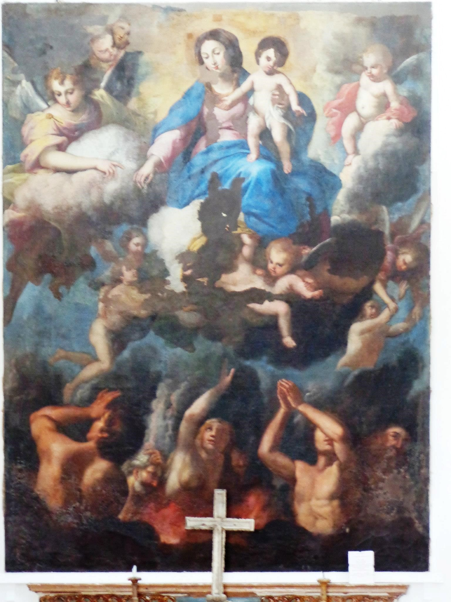 Dipinto altare maggiore. Foto presente su pagine web personali e sul profilo FB.